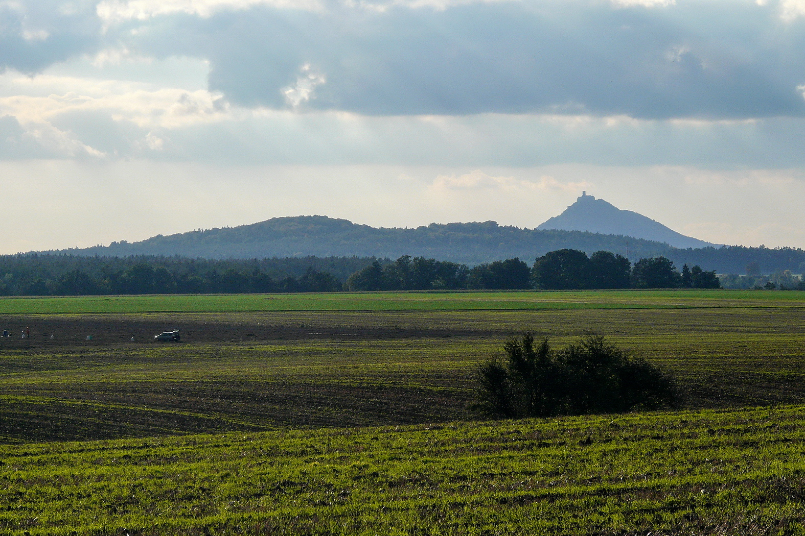 Radechov a Bezděz nad Bukovinskou tabulí